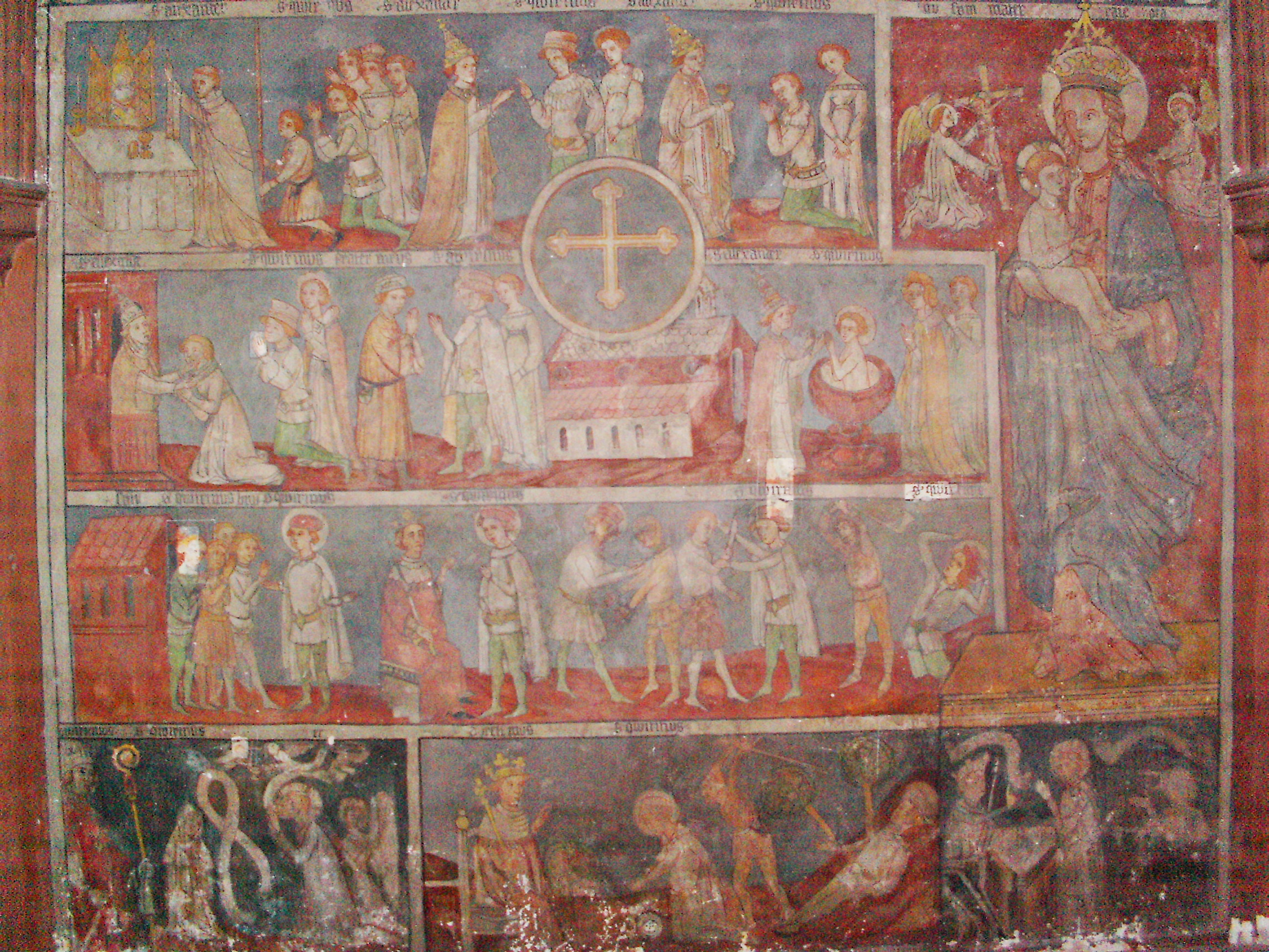 Klosterkirche Lambrecht (Pfalz), mittealterliche Quiriniuswand